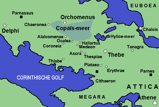 Description Kaart van het Antieke Boeotië waarop de voornaamste steden zijn aangeduid. Date2006/2007SourceGebaseerd op de Engelstalige kaart van het antieke Boeotië op de Engelstalige Wikipedia.AuthorKaart: Petrouchka; vertaling: Evil berryPermission (Reusing this file) PD-self Other versions nl::en:Image:Boeotia ancient.png Categorie:Kaart Categorie:Afbeelding oudheid Kaart van het Antieke Boeotië waarop de voornaamste steden zijn aangeduid.